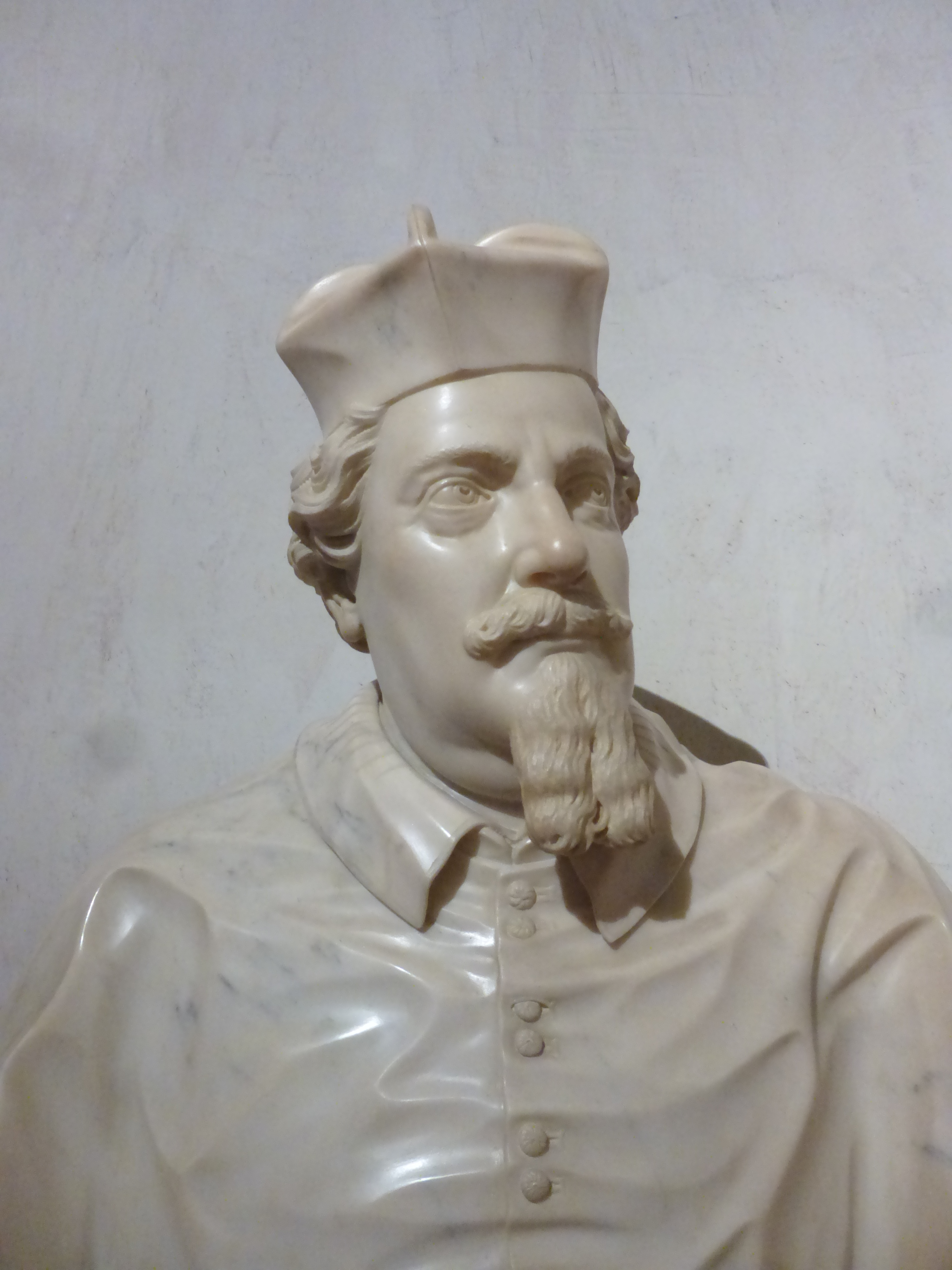 Museo di Roma a Palazzo Braschi. Busto del cardinale Giulio Gabrielli seniore (Giuseppe Mazzuoli, 1694-1700)